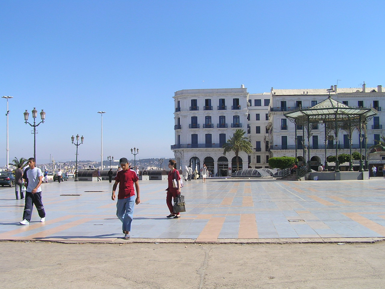 martyrs square, Algeri, Algeria2005-08-03_17h16_05